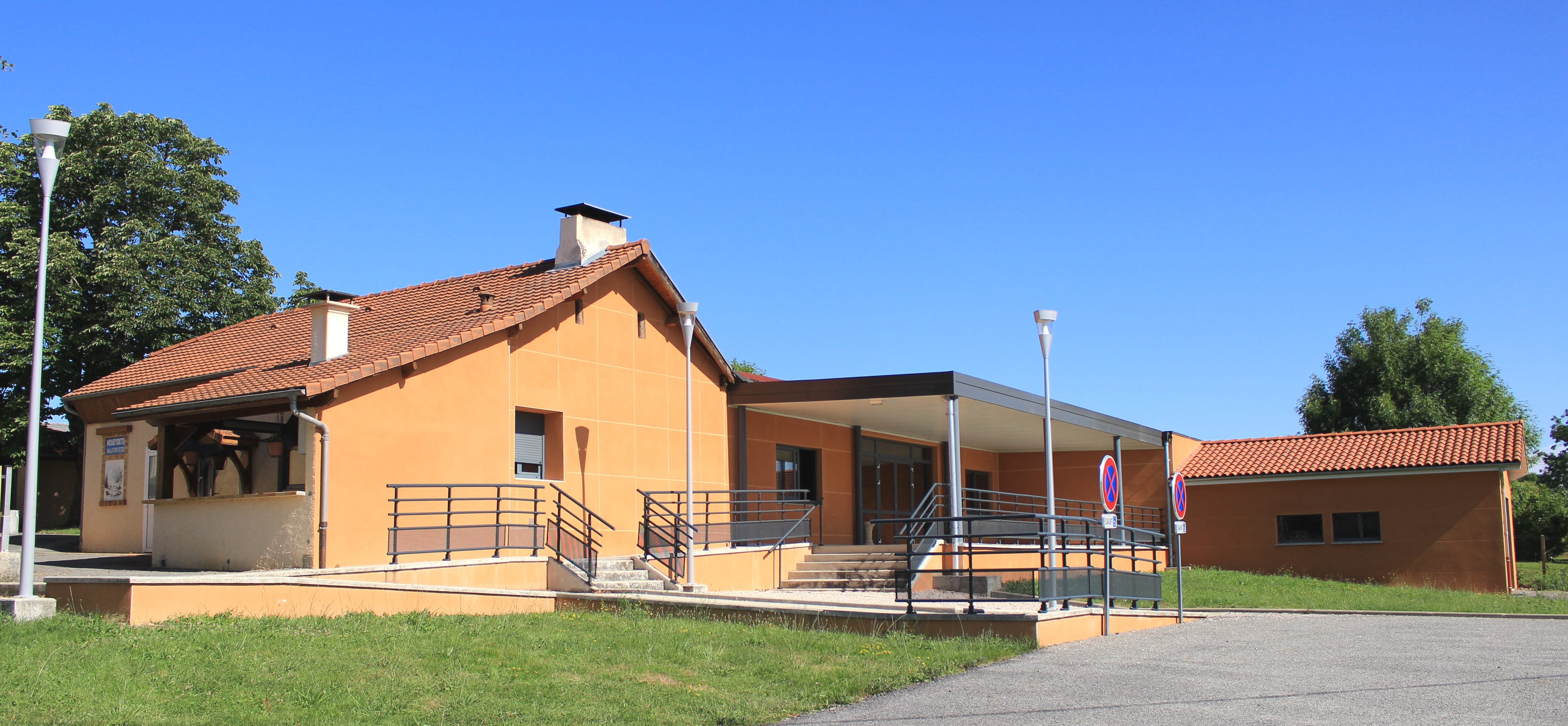 Salle des fêtes de Houeydets (Hautes-Pyrénées)